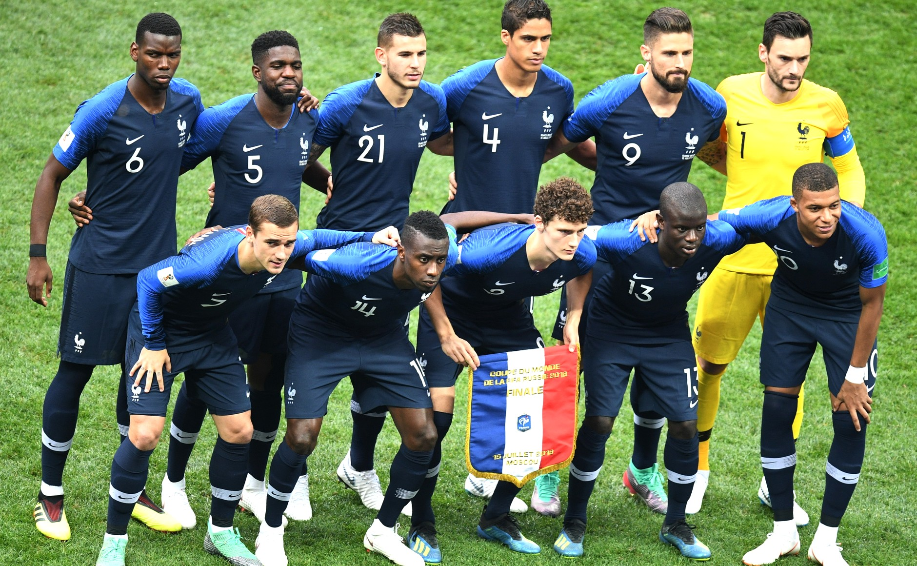 Стартовый состав сборной Франции перед финалом чемпионата мира 2018 в России. Второй ряд, слева направо: Поль Погба, Самюэль Умтити, Люка Эрнандес, Рафаэль Варан, Оливье Жиру, Уго Льорис; первый ряд, слева направо: Антуан Гризманн, Блез Матюиди, Бенжамен Павар, Н’Голо Канте, Килиан Мбаппе.